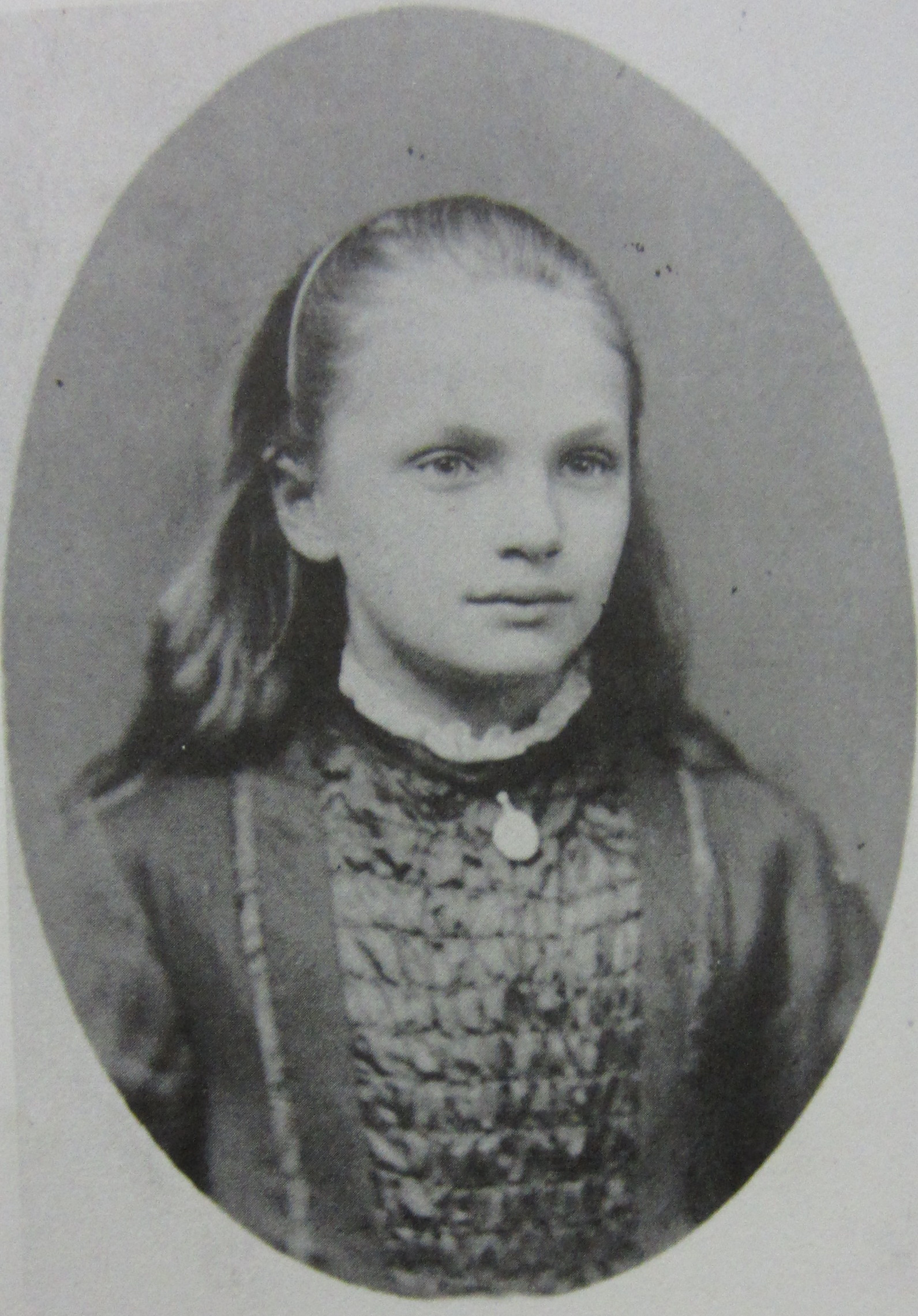 Jacqueline Elisabeth van der Waals als jong meisje.